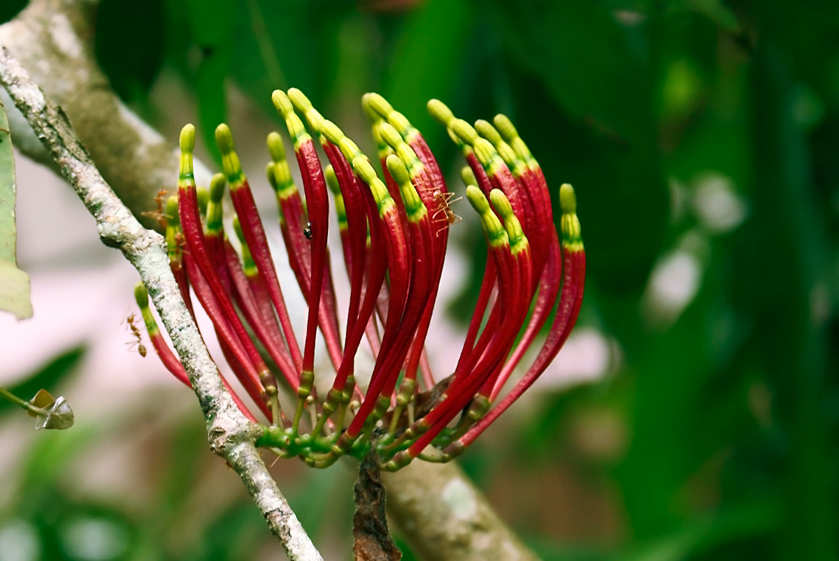 ഇത്തിൾ പൂവ്